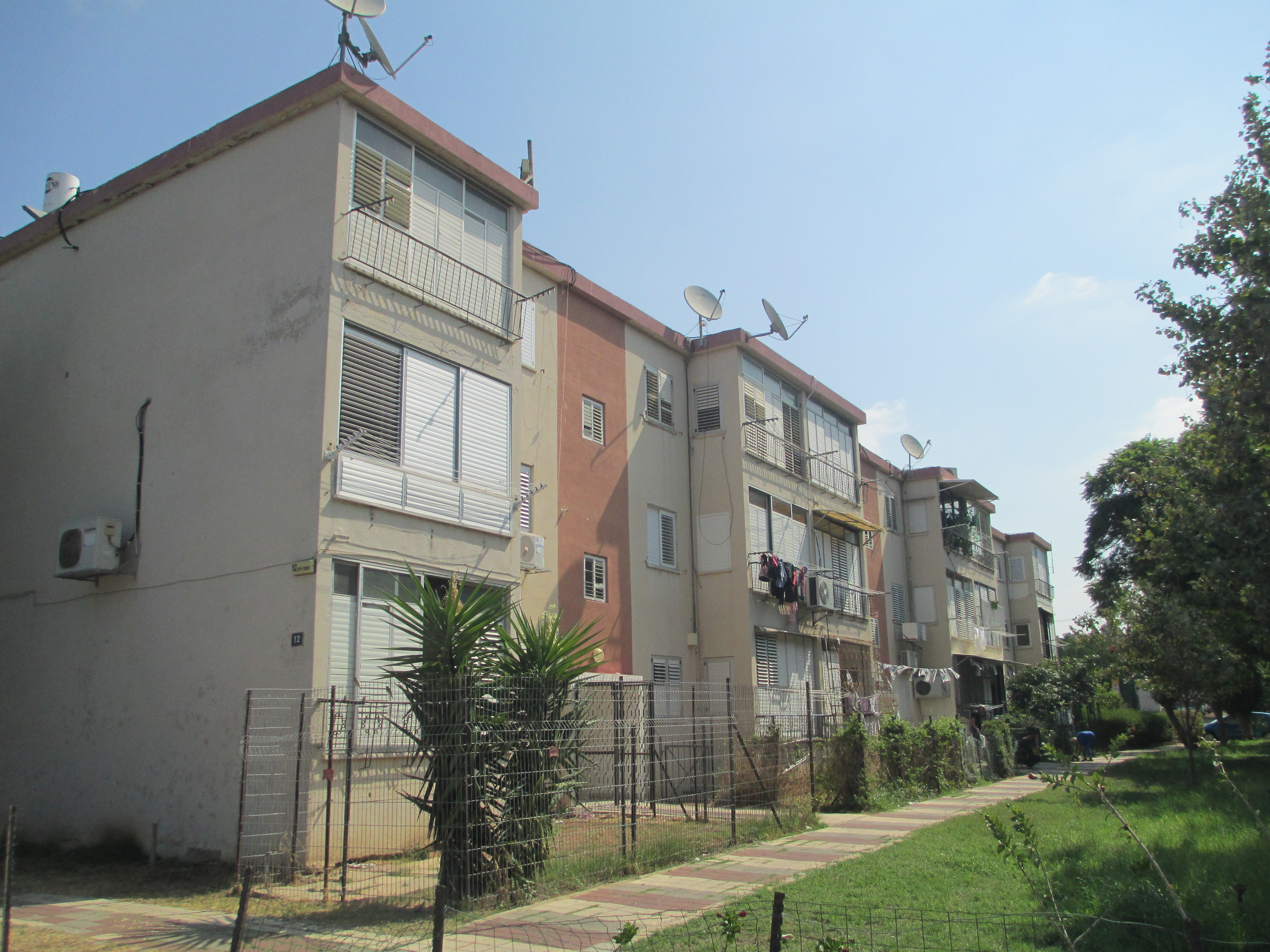 בתים בנווה צה"ל